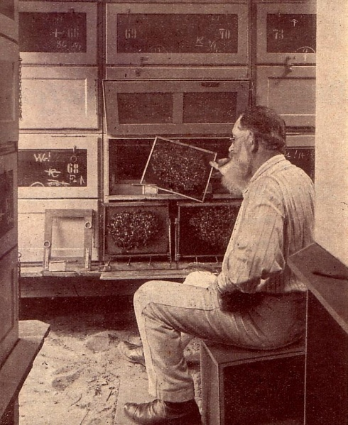 Max Kuntzsch (2)